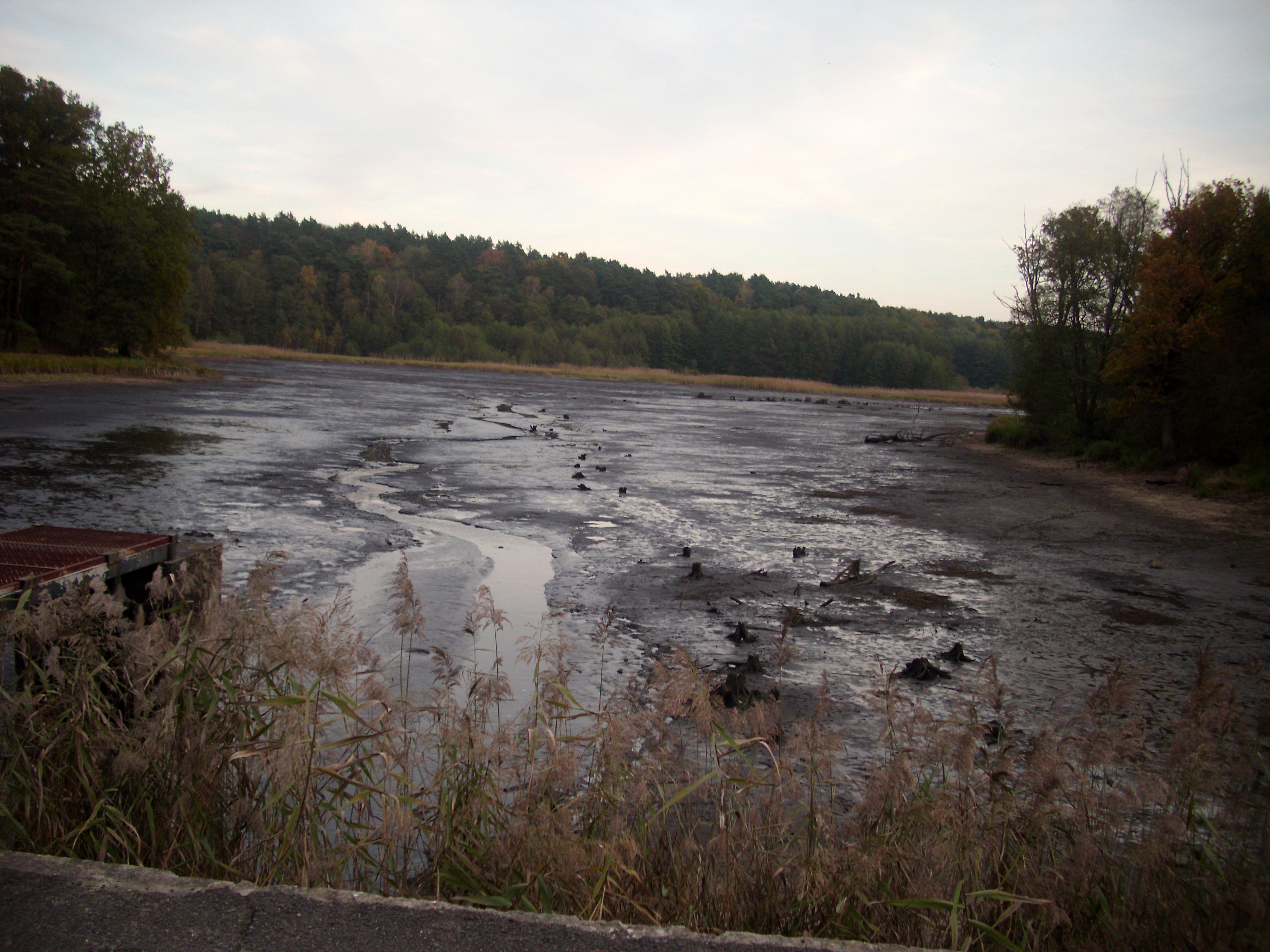 abgelassener Mühlteich, Jankemühle, Friedland im Naturpark Schlaubetal, Brandenburg